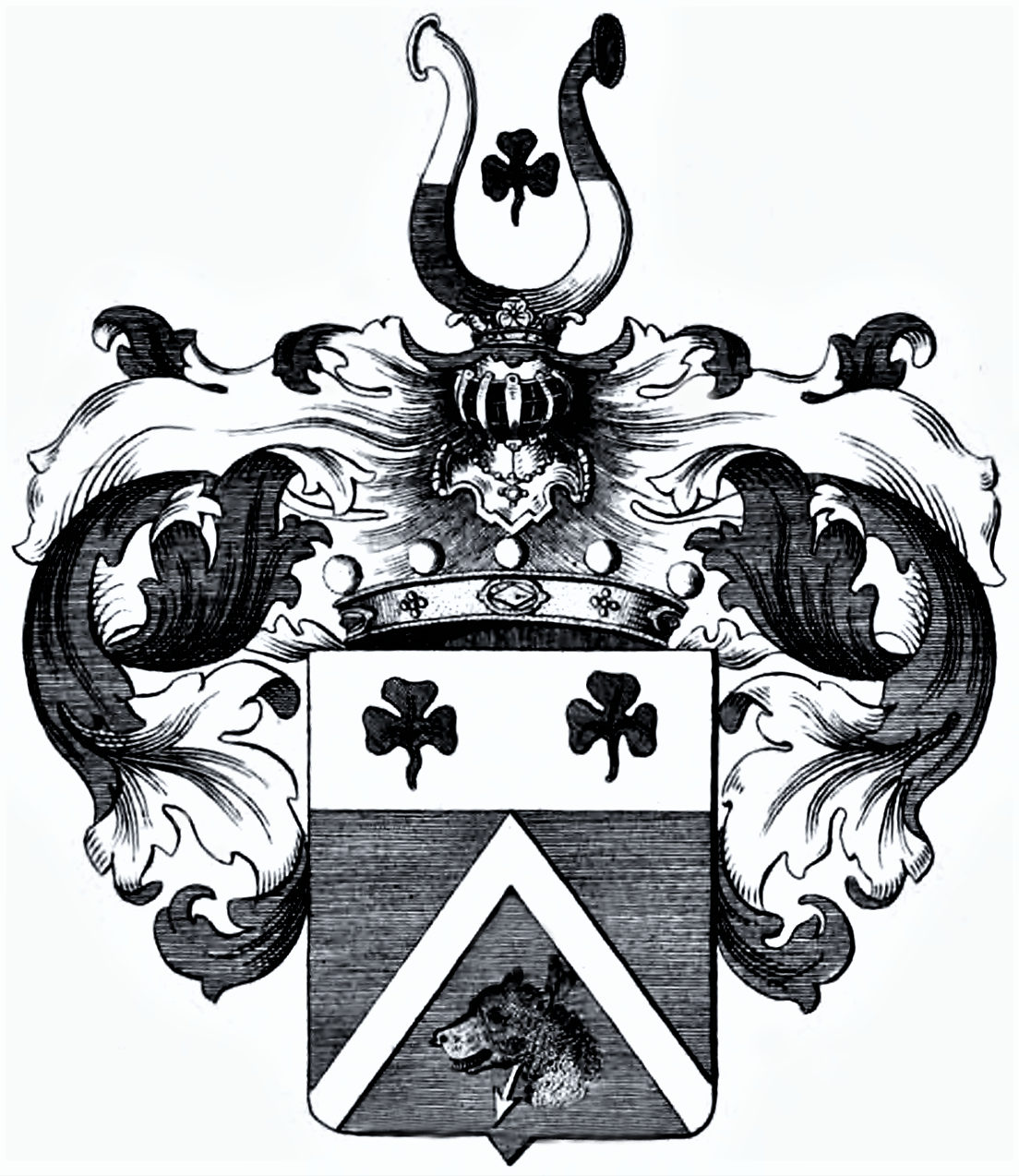 Wappen der Freiherren von Jacquin 1806